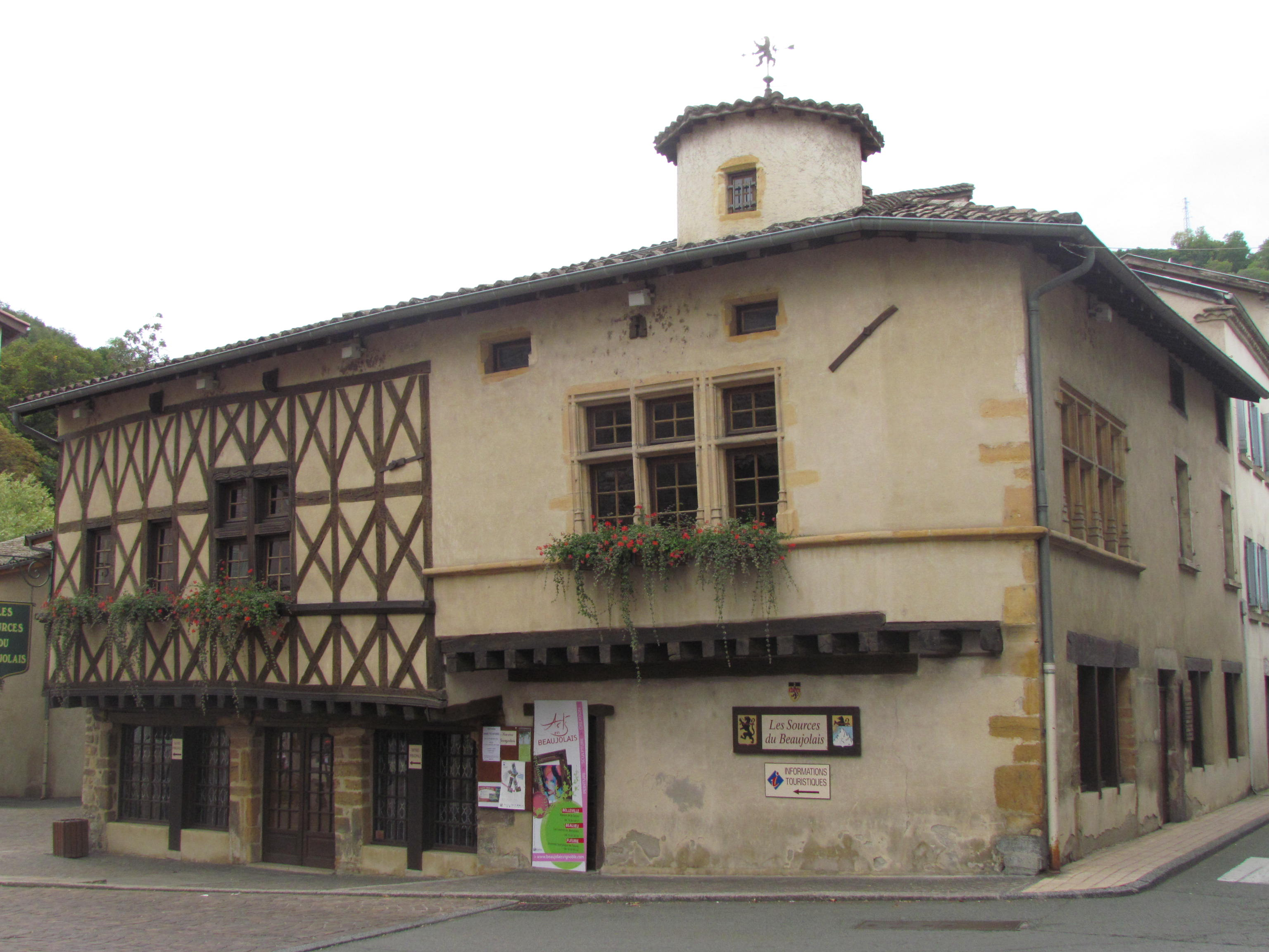 Maison à pans de bois. Les façades et la toiture .